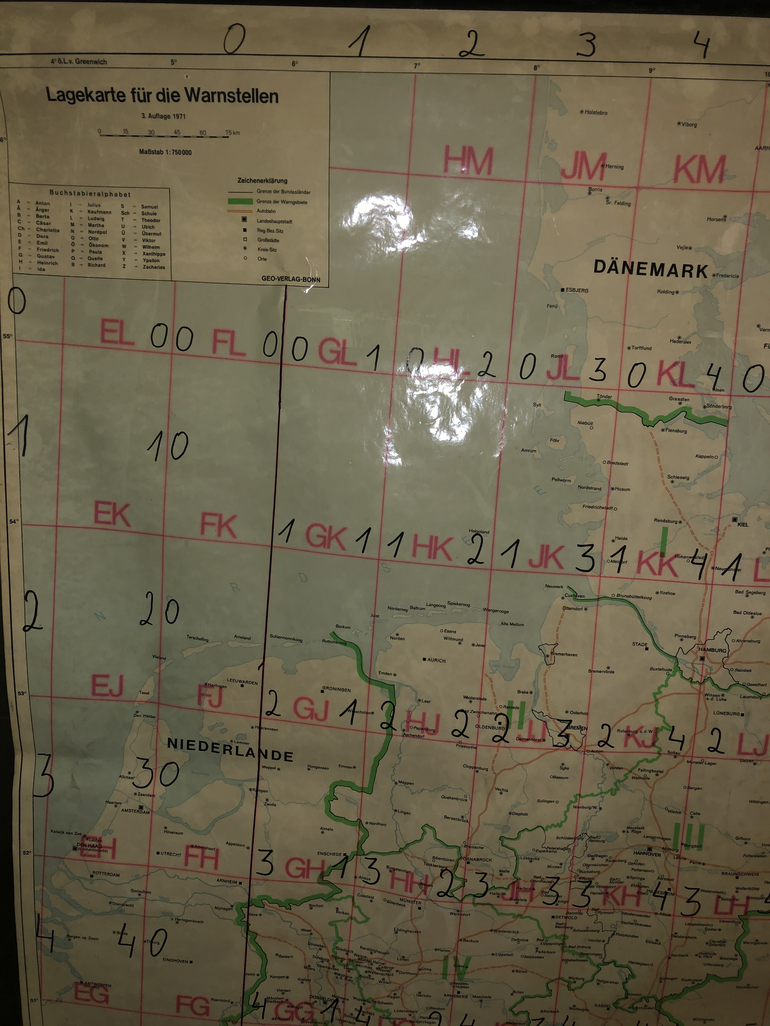 Mehrzweckanlage Sedanplatz Lagekarte Warnstellen